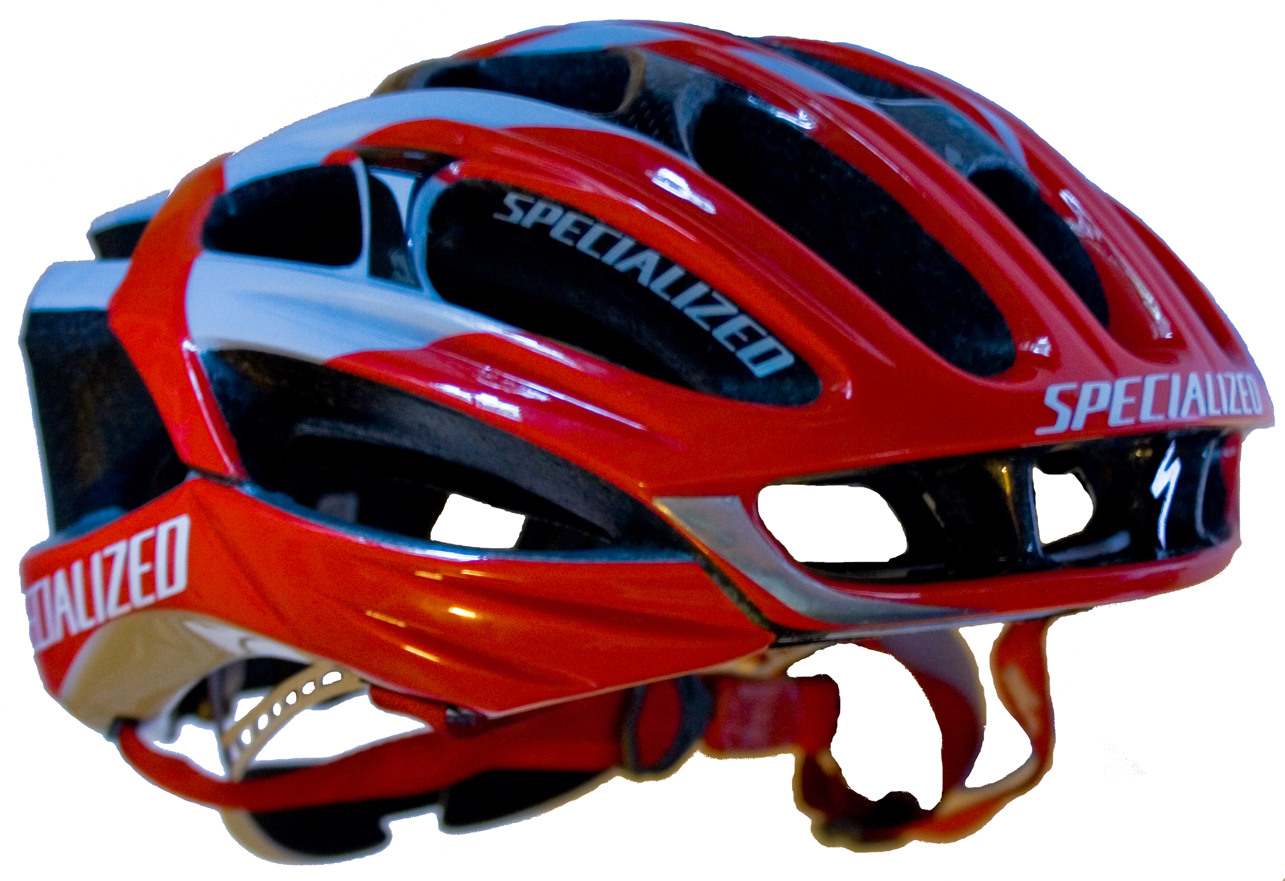 Casque de vélo de course